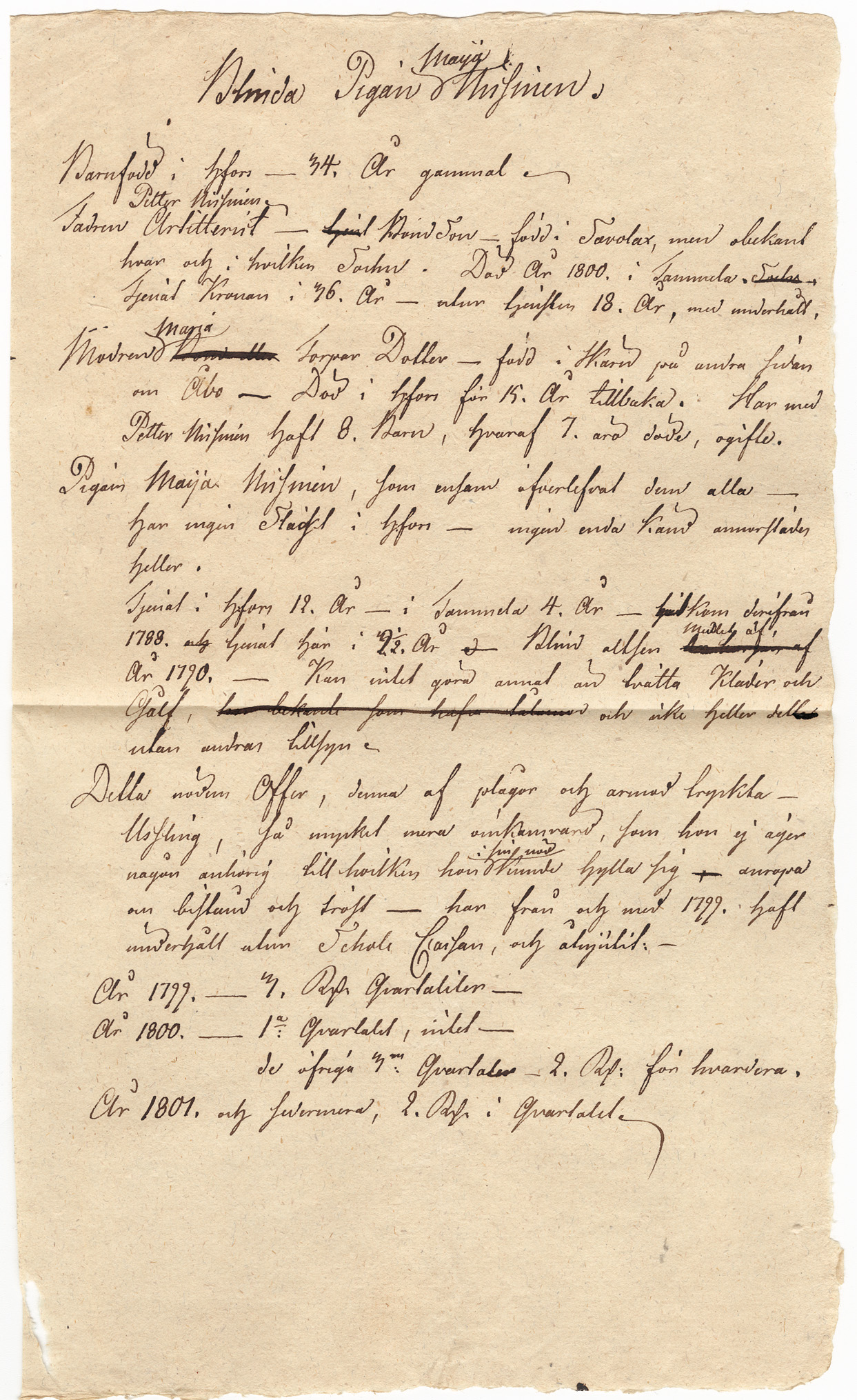 Suomenlinnassa asuneen piika Maija Nissisen avustusanomus 1800-luvun alkuvuosilta.